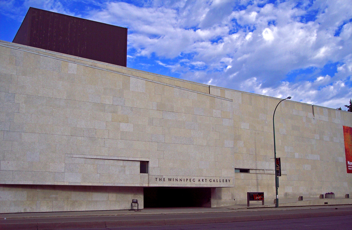 Winnipeg Art Gallery